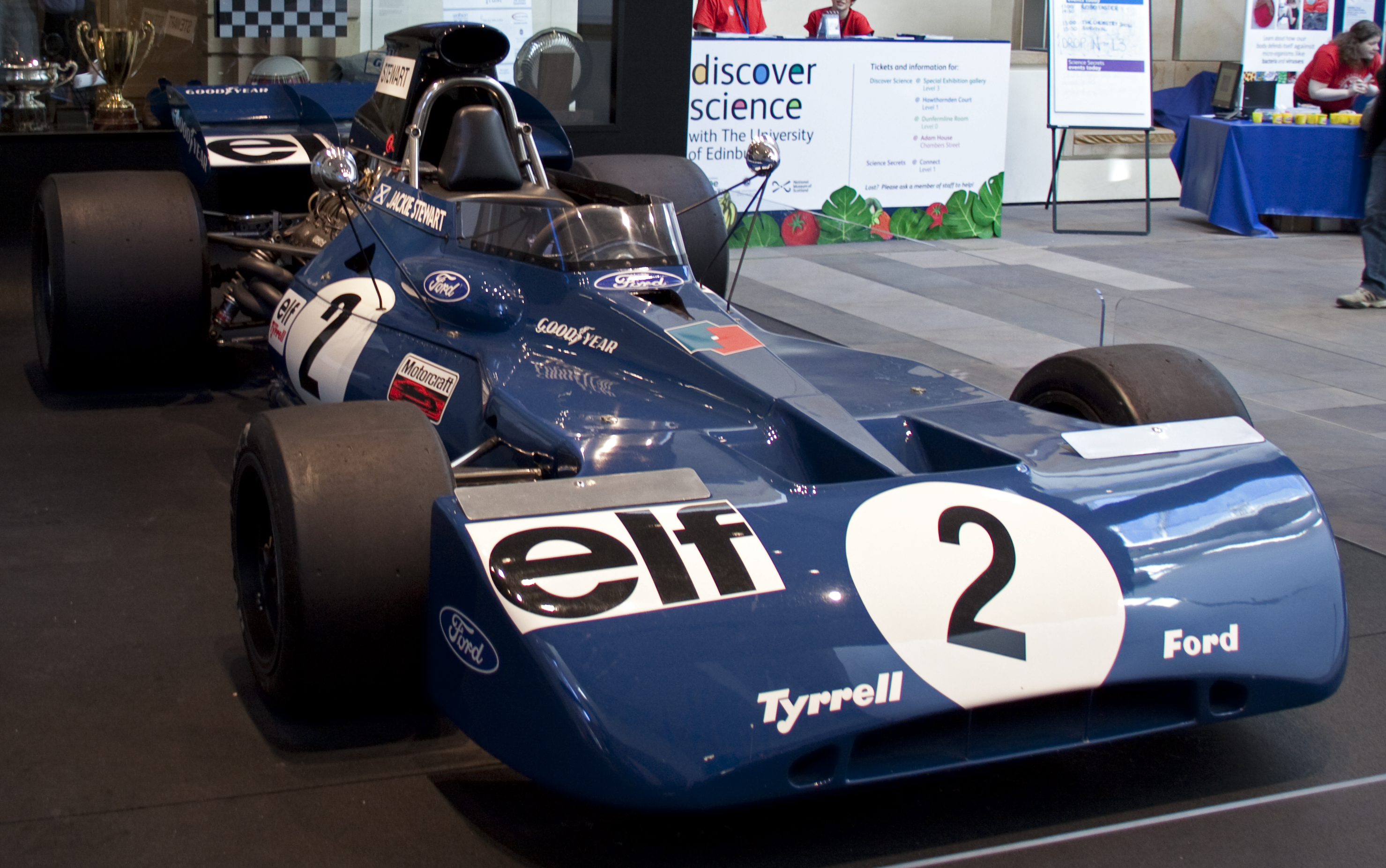 Tyrrell Ford